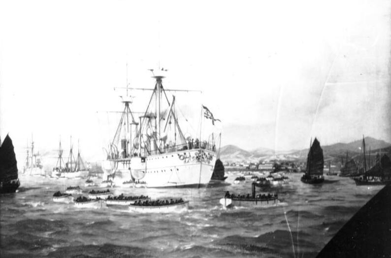 Schutzgebiet Kiautschou Besitznahme von Kiautschou am 14. Nov. 1897 durch Kaiserl. Marineeinheiten